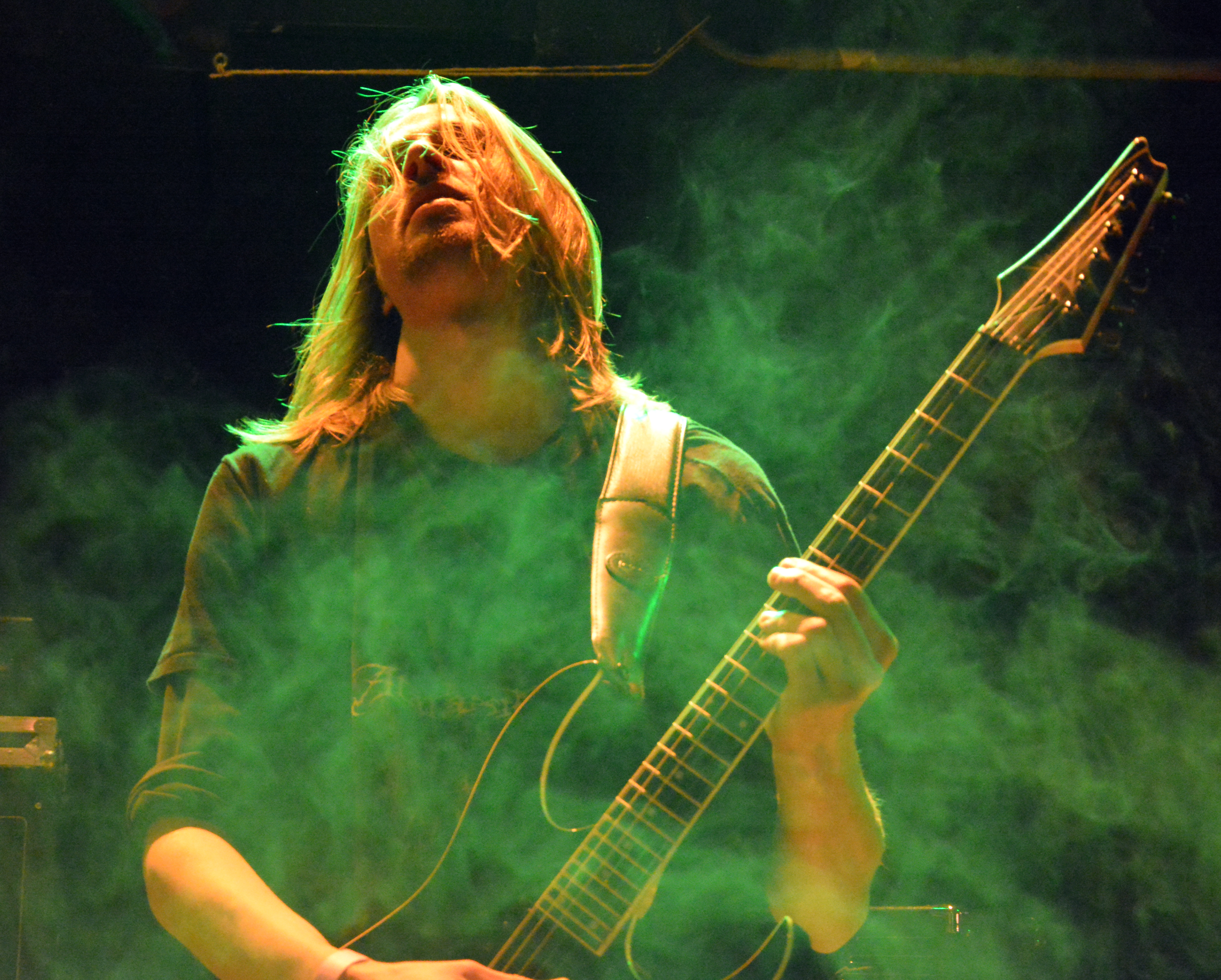 Fäulnis beim Heathen Rock Festivals 2014 im Rieckhof in Hamburg-Harburg